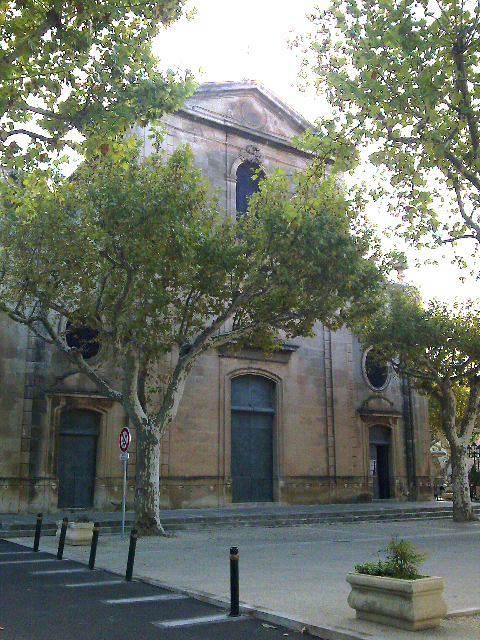 43°43′16.7″N 4°48′18.7″E / 43.721306°N 4.805194°E